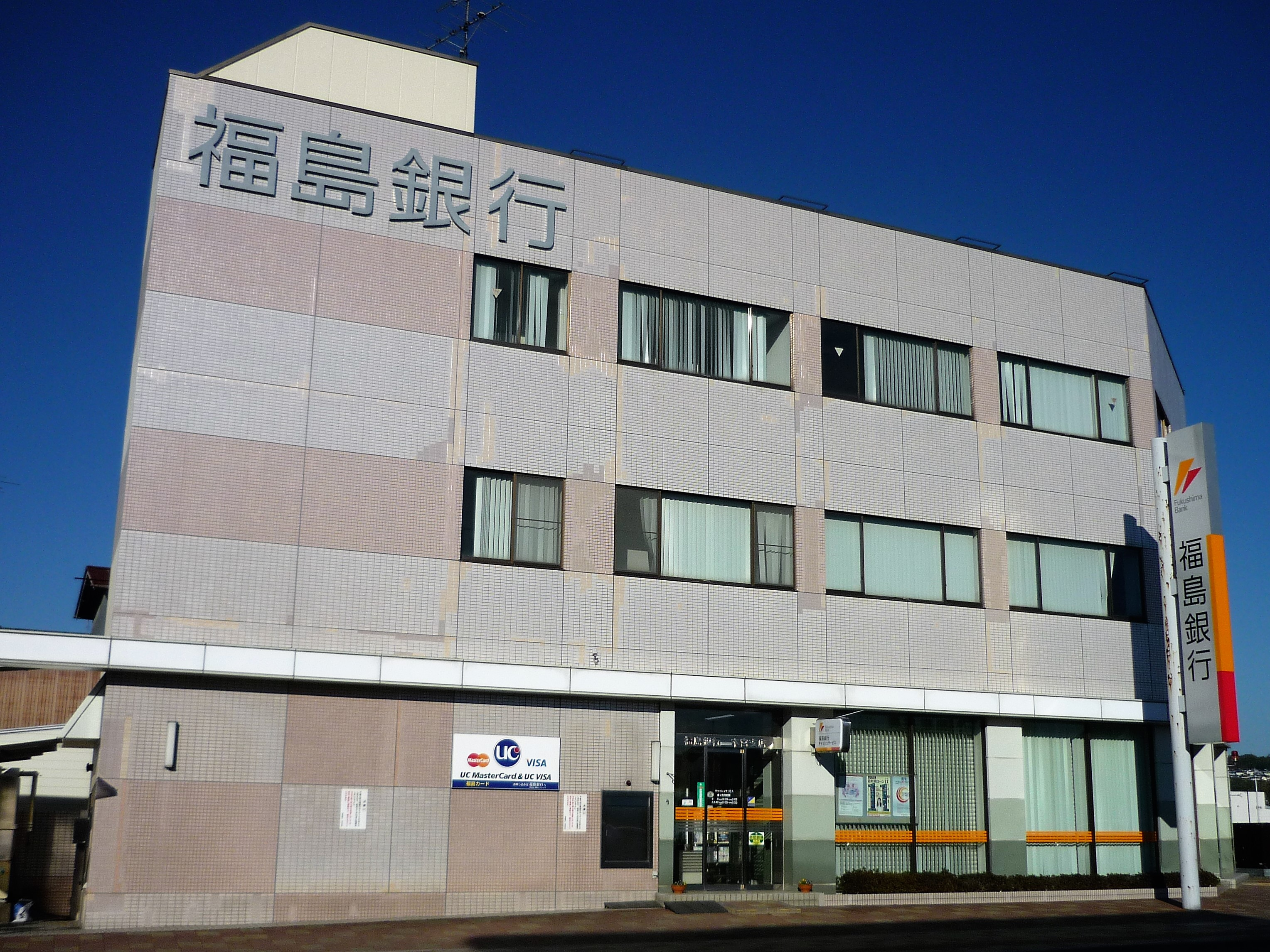 福島銀行本宮支店（本宮市本宮字中條） Panasonic Lumix DMC-FS3